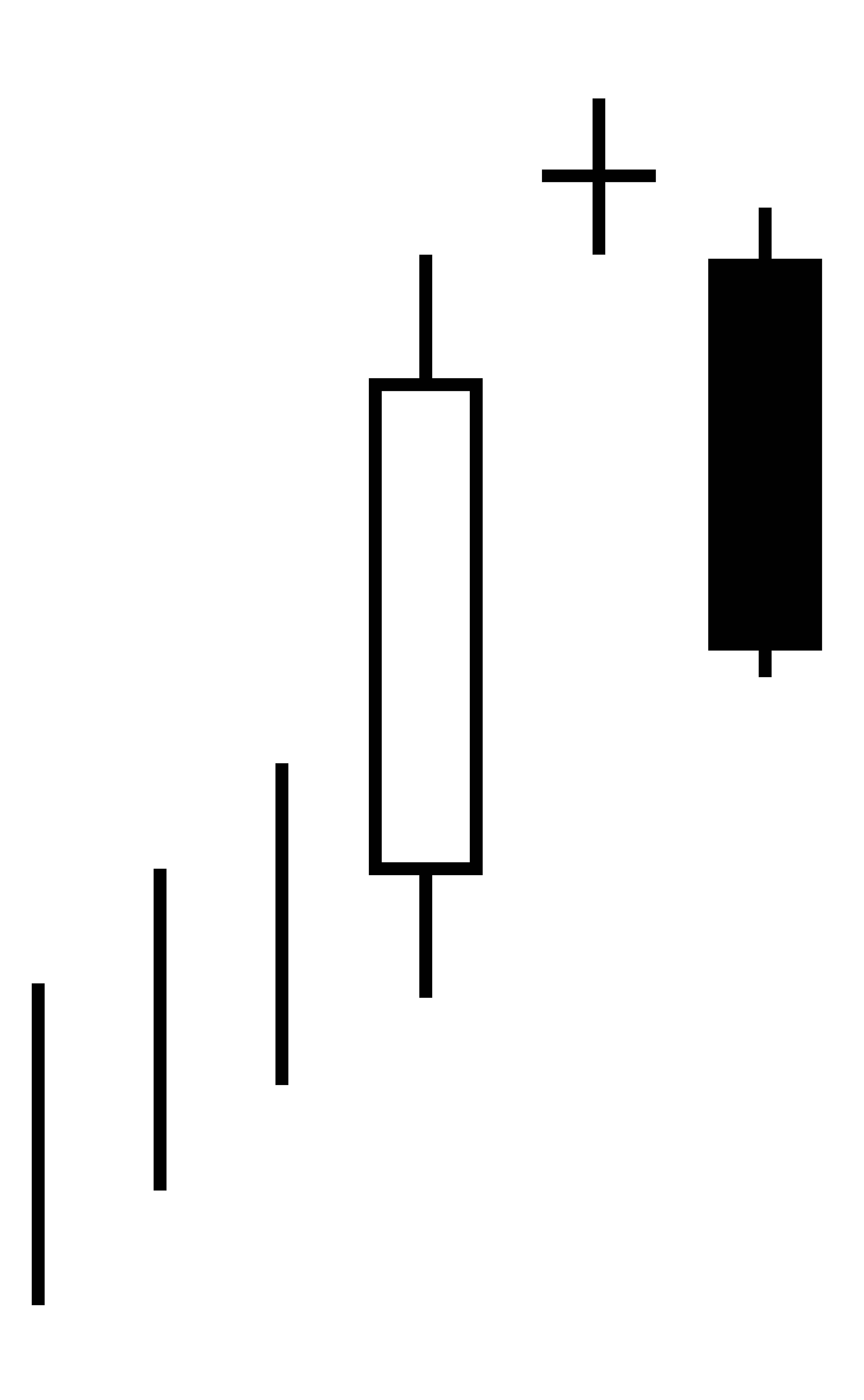 Bearish Evening Doji Star